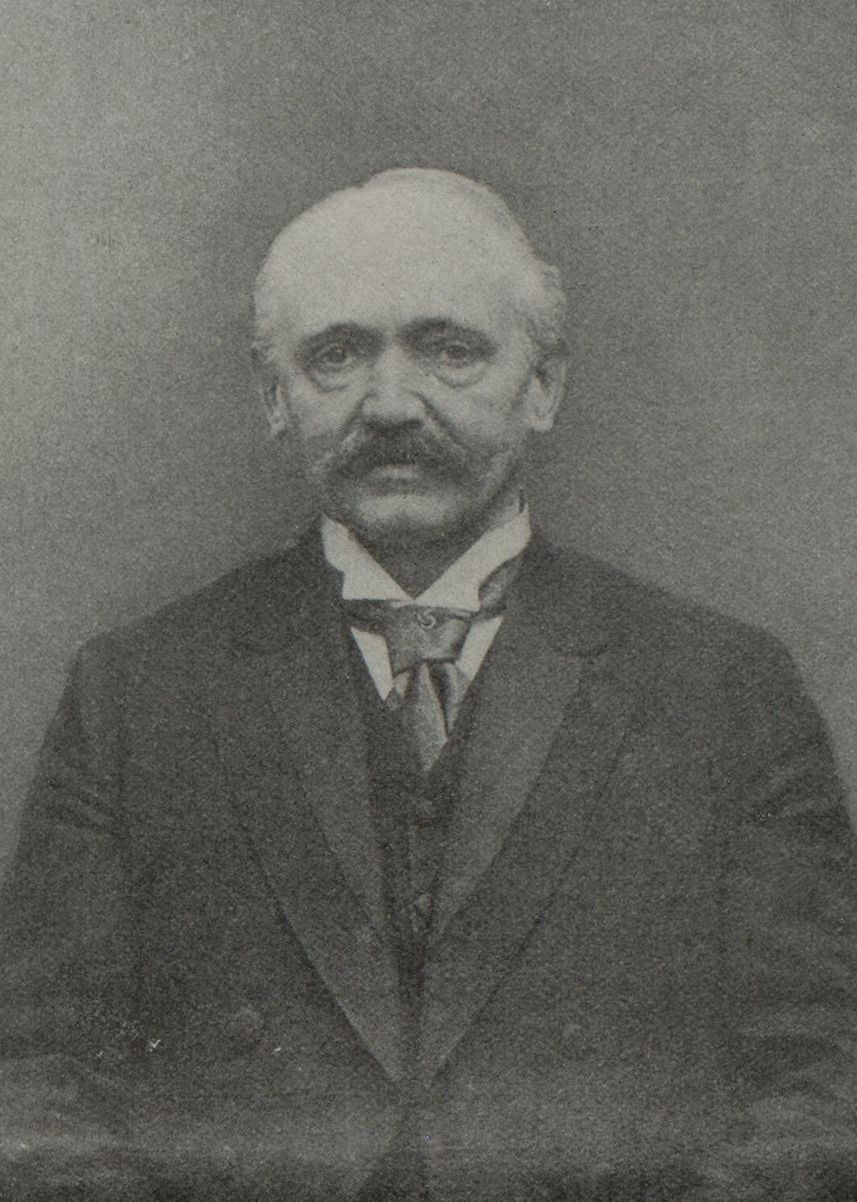 Porträtfoto von Walter Körte